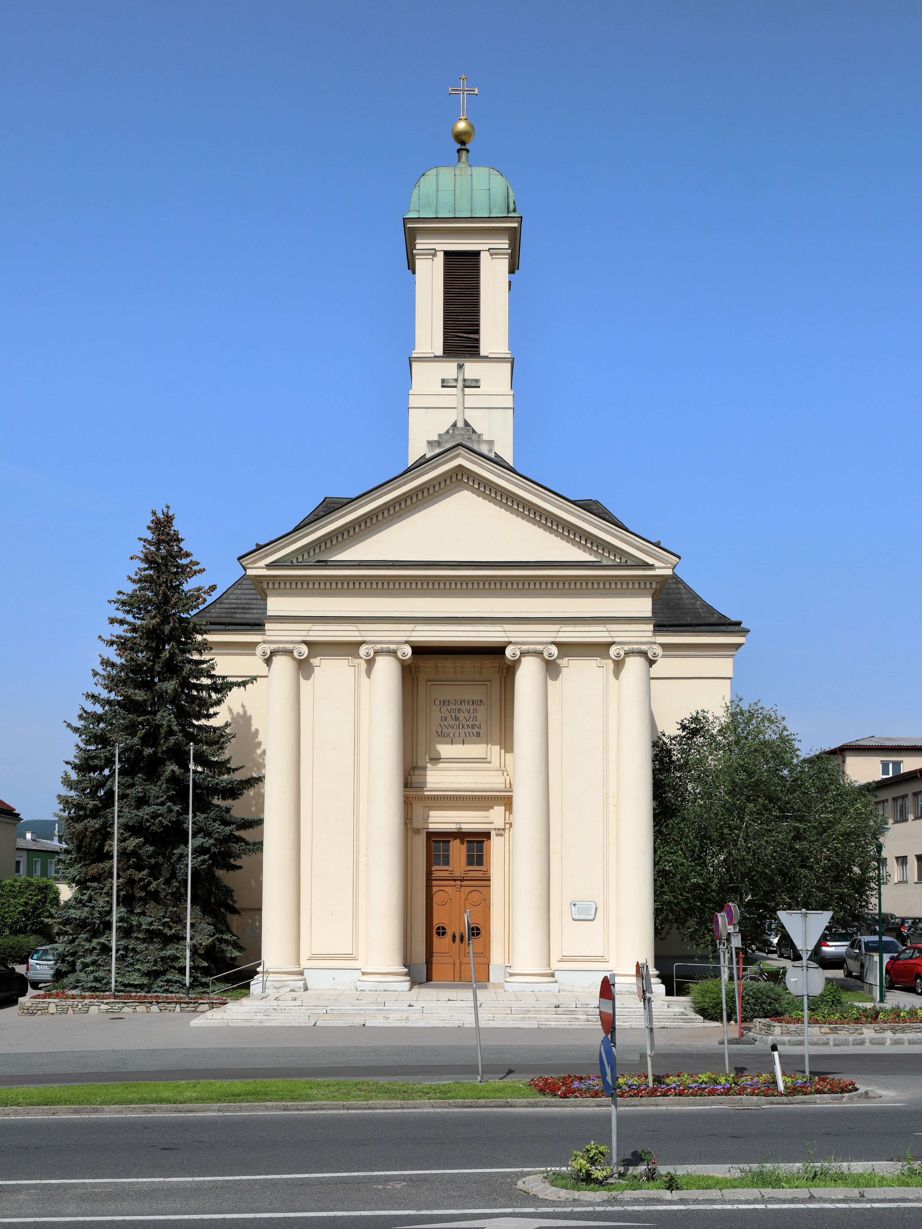 Ostansicht der röm.-kath. Pfarrkirche Maria Schnee in der niederösterreichischen Marktgemeinde Wiener Neudorf.